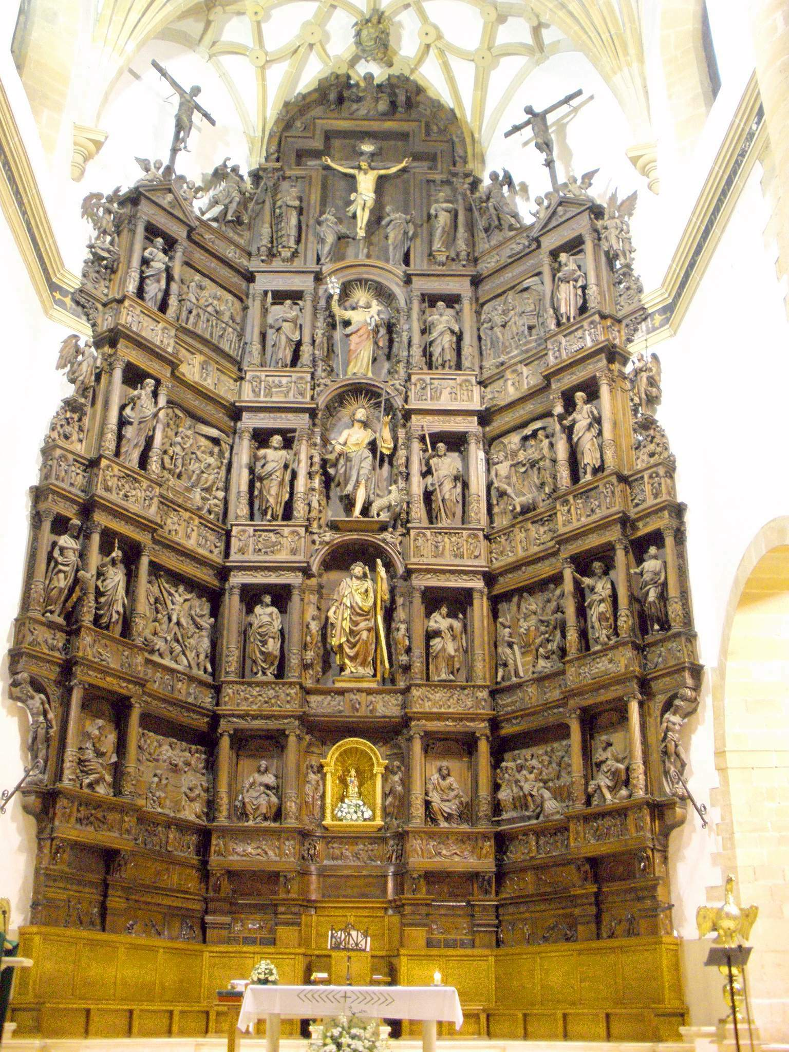 Iglesia de San Andrés de Éibar (Gipuzkoa)